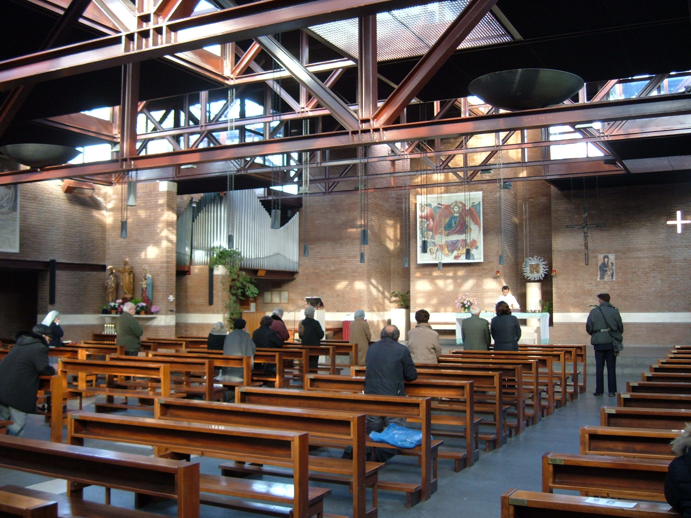 Chiesa di San Valentino, a Roma, nel quartiere Parioli (Villaggio Olimpico).